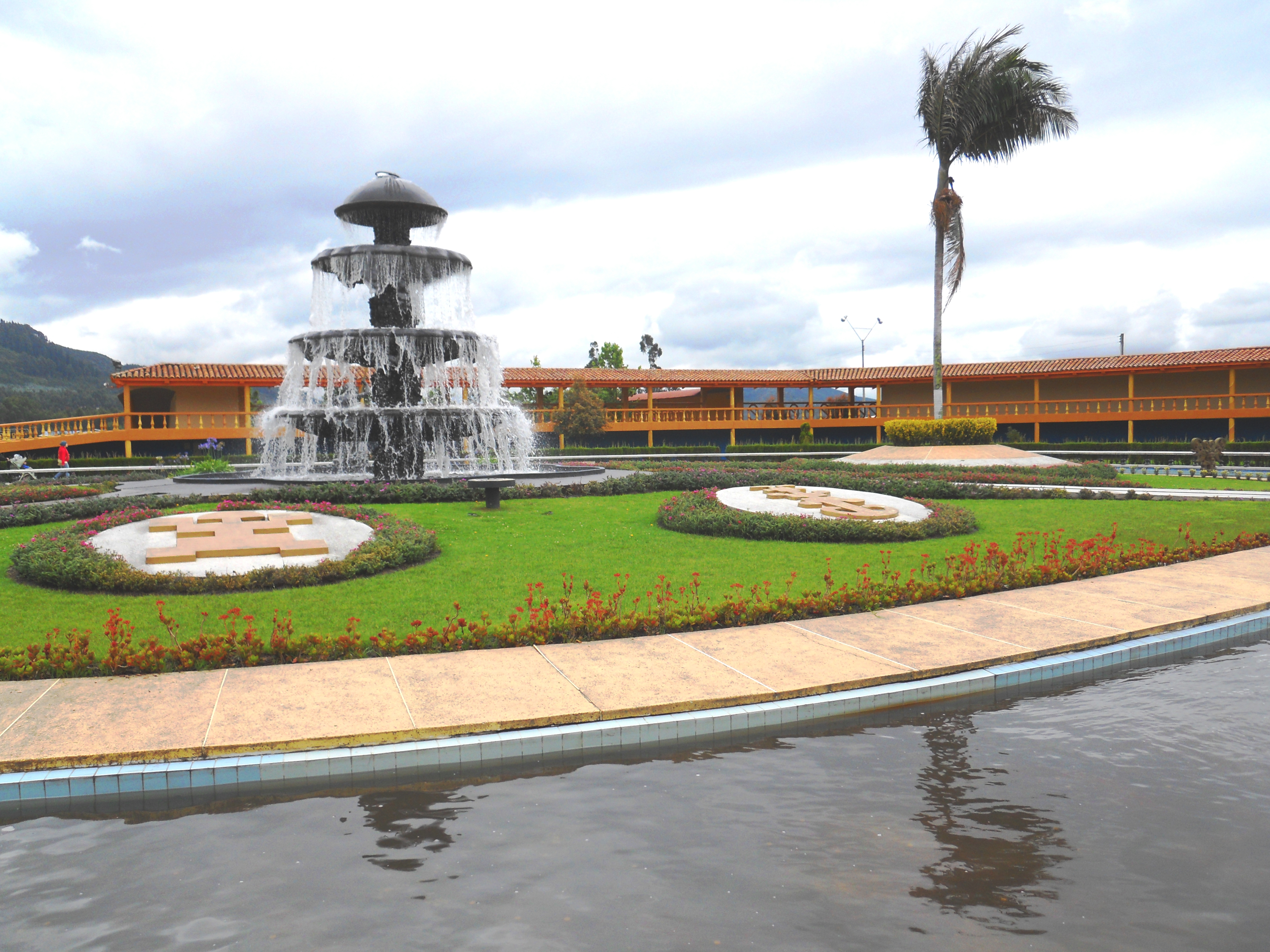 Fuente en el Parque Jaime Duque. Jardín de Neptuno.